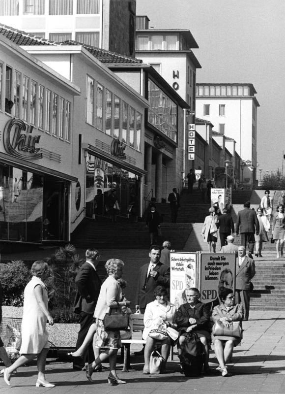 24.9.1969 Wahlkampfreise Bundesminister Willy Brandt durch Oberhessen und Niedersachsen Kassel